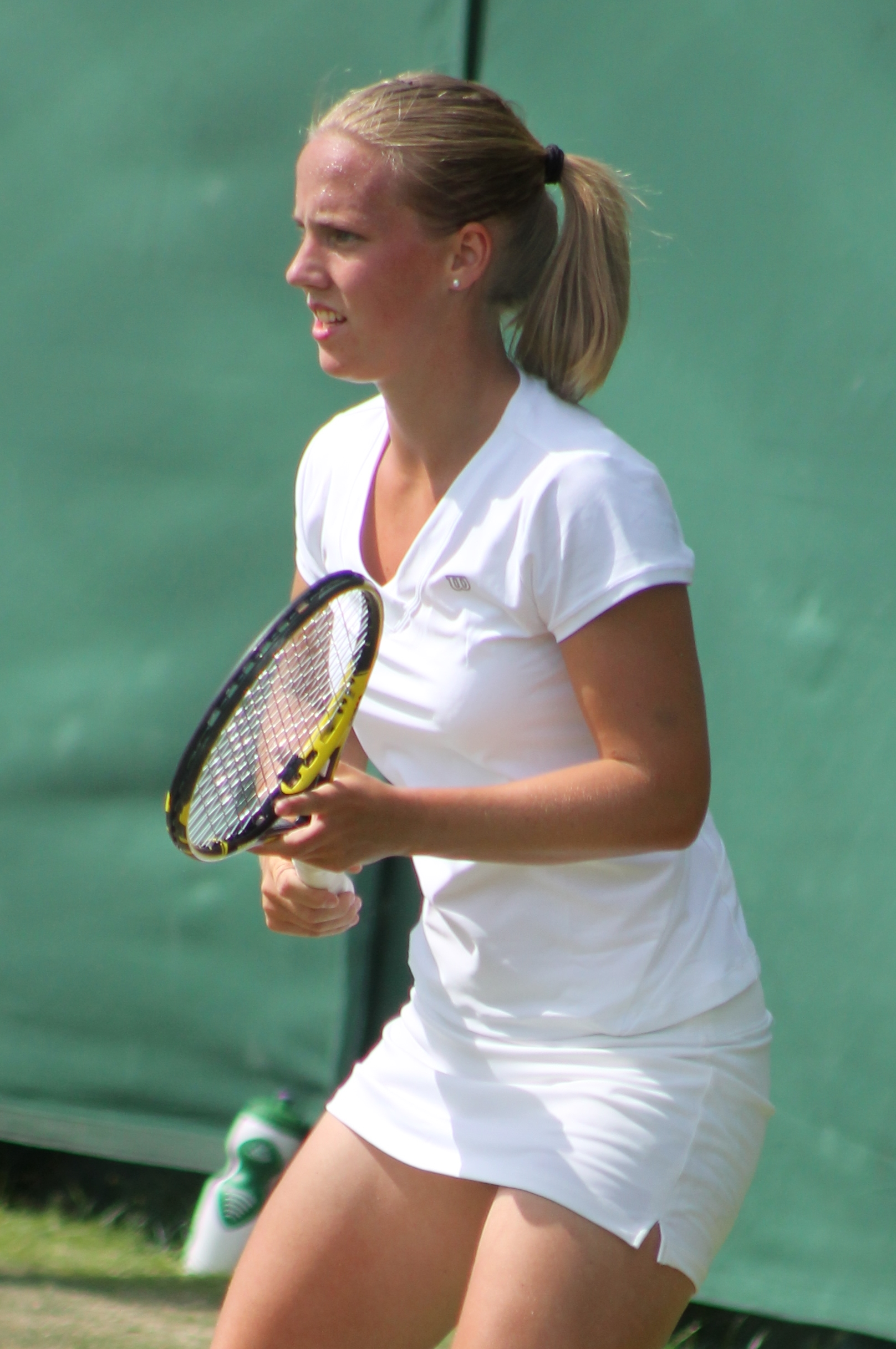 Hogenkamp WMQ14 (5)